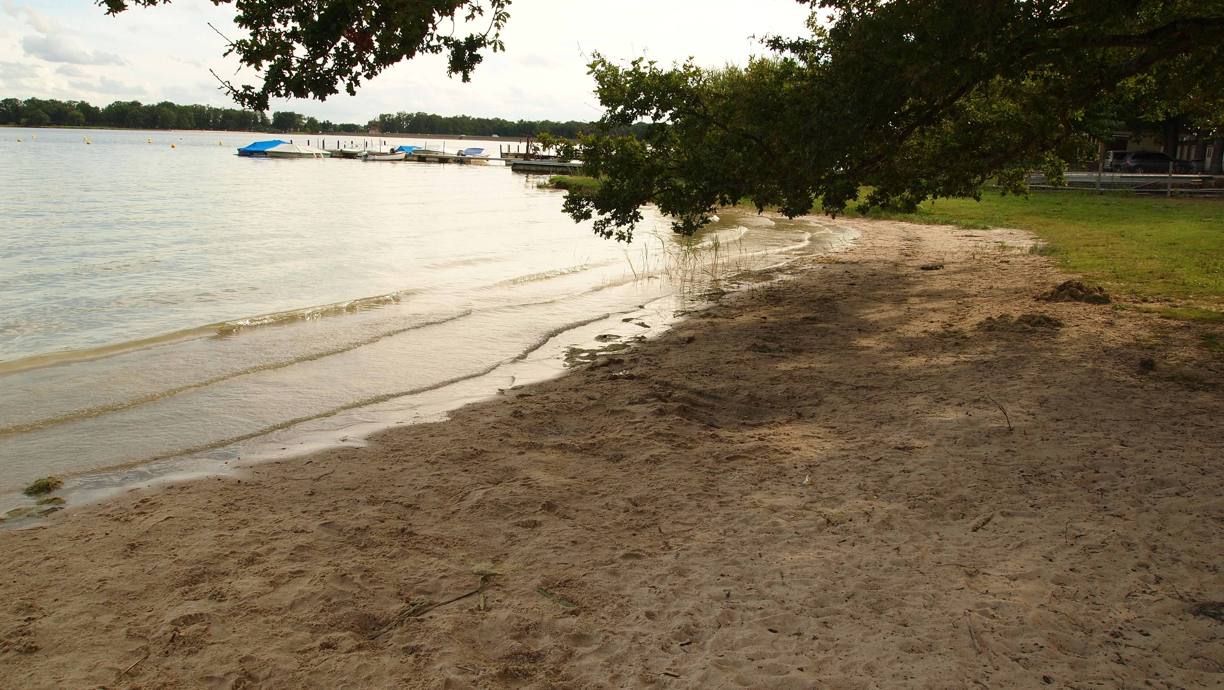 Étang du Puits, plage de Cerdon, Sologne, Loiret, Centre, France